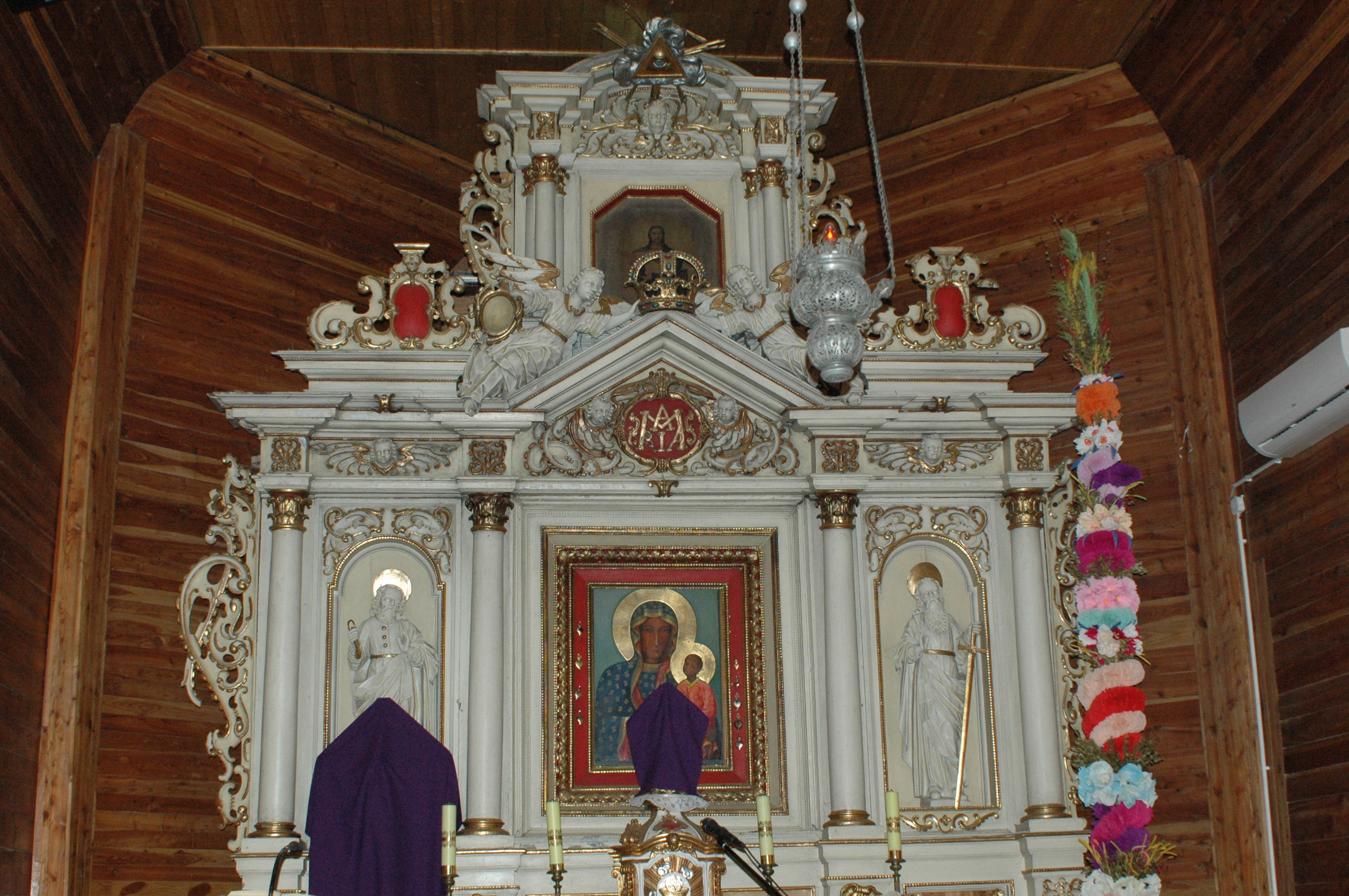 Polska, Ślesin - kościół św. Mikołaja, ołtarz główny